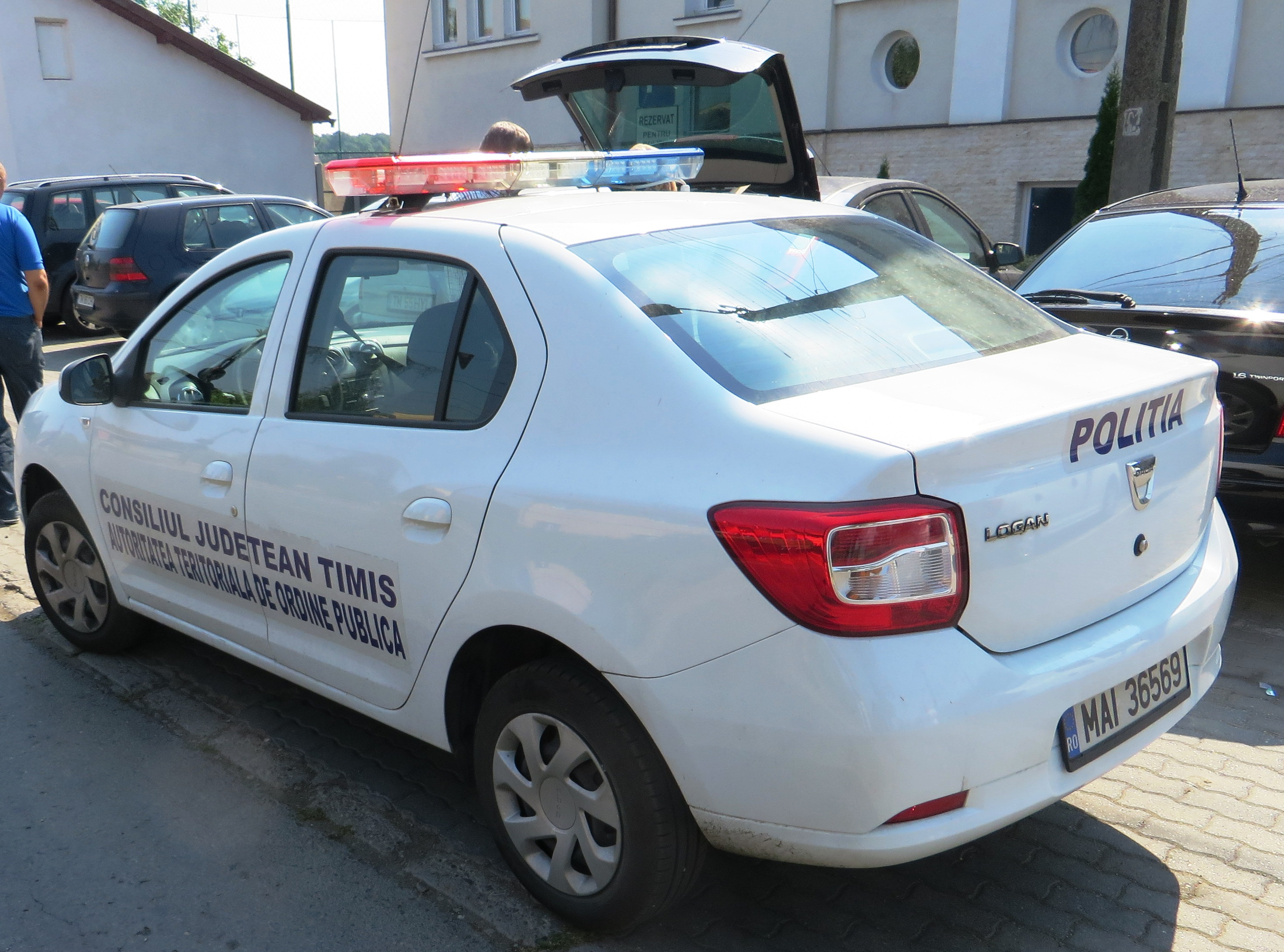 Lokale politie auto Timișoara